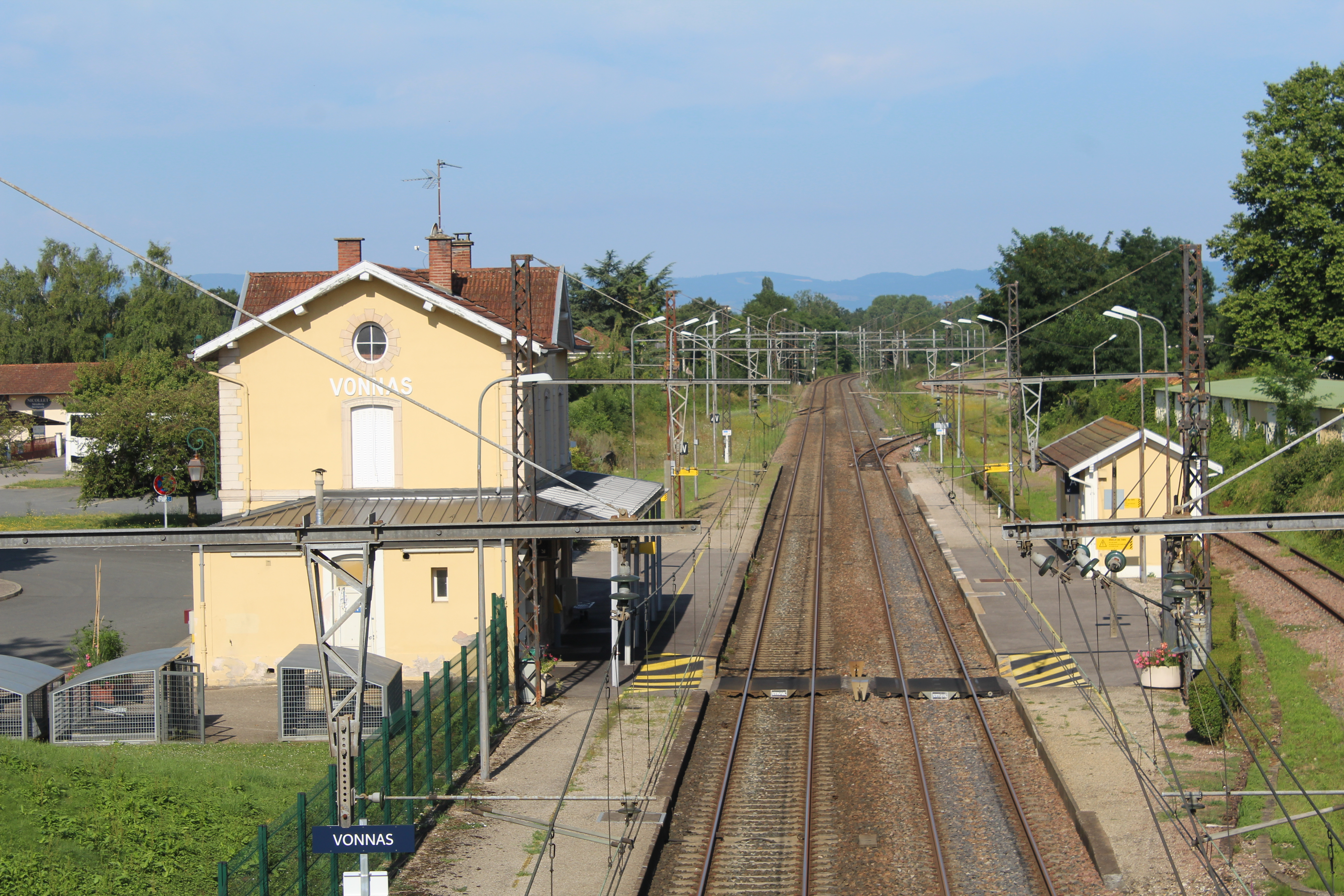 Gare de Vonnas.